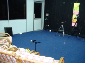 Studio CyKidzCRAZE